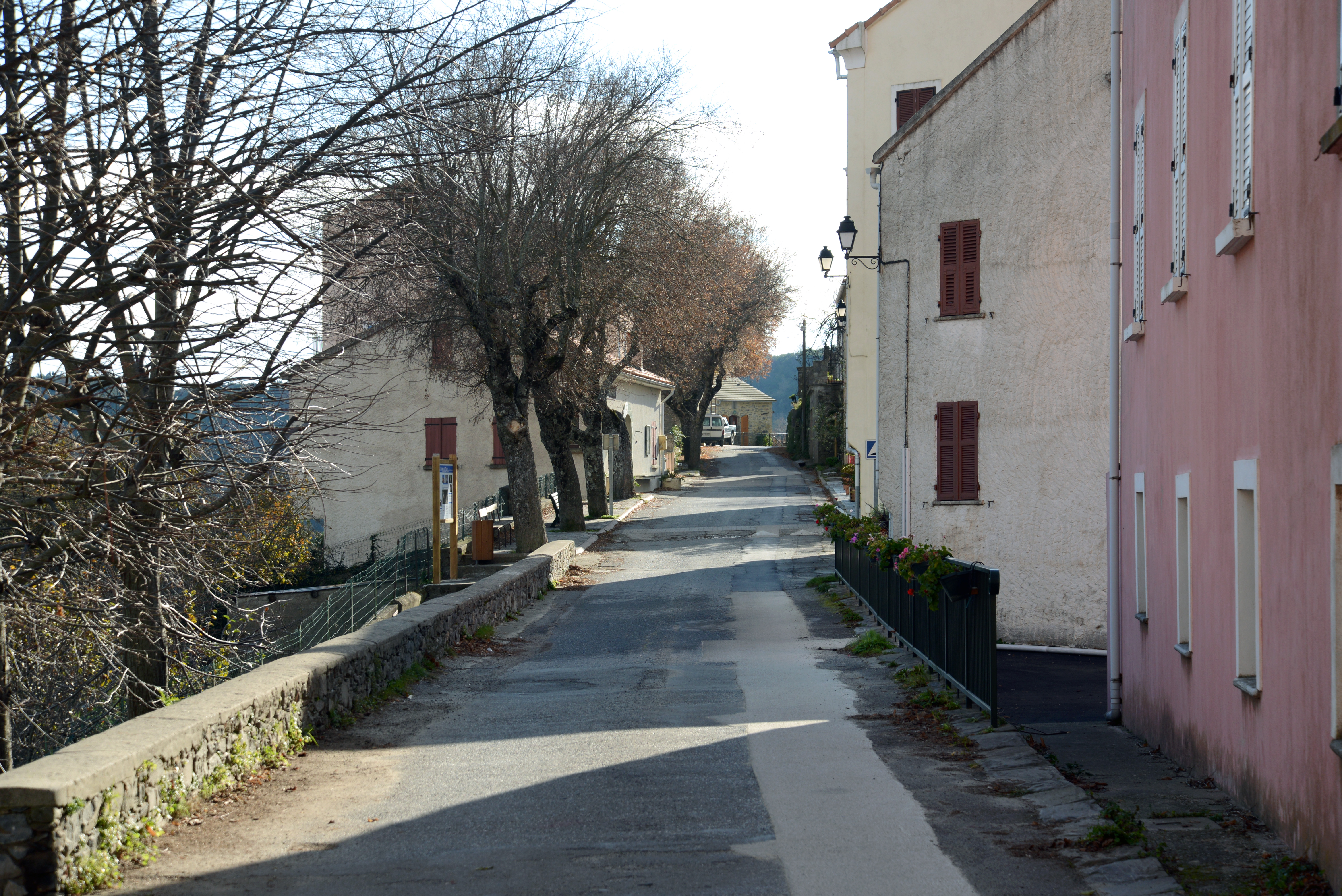 Pietraserena, Castagniccia (Haute-Corse) - La rue principale du village ou route D14